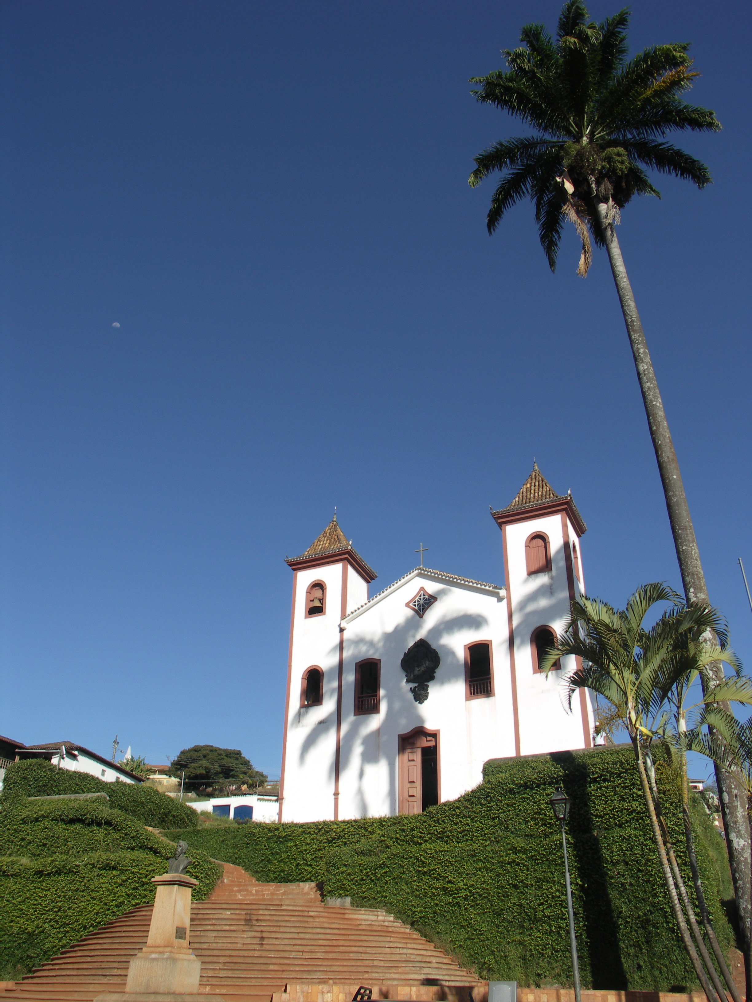 Igreja do Carmo Foto: Ricardo Moraleida. Foto: Ricardo Moraleida.